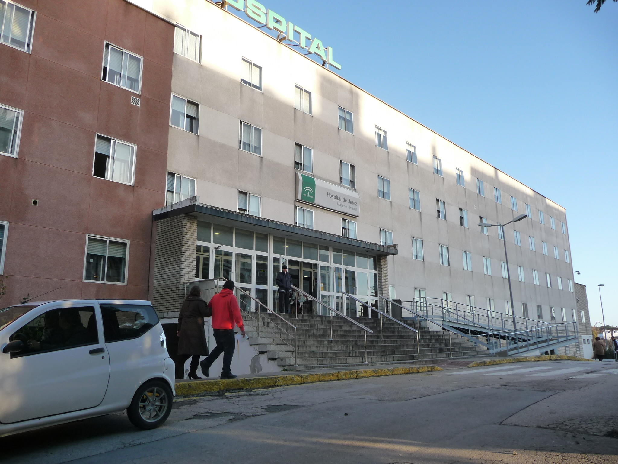 Hospital de Jerez de la Frontera (Andalucía, España)